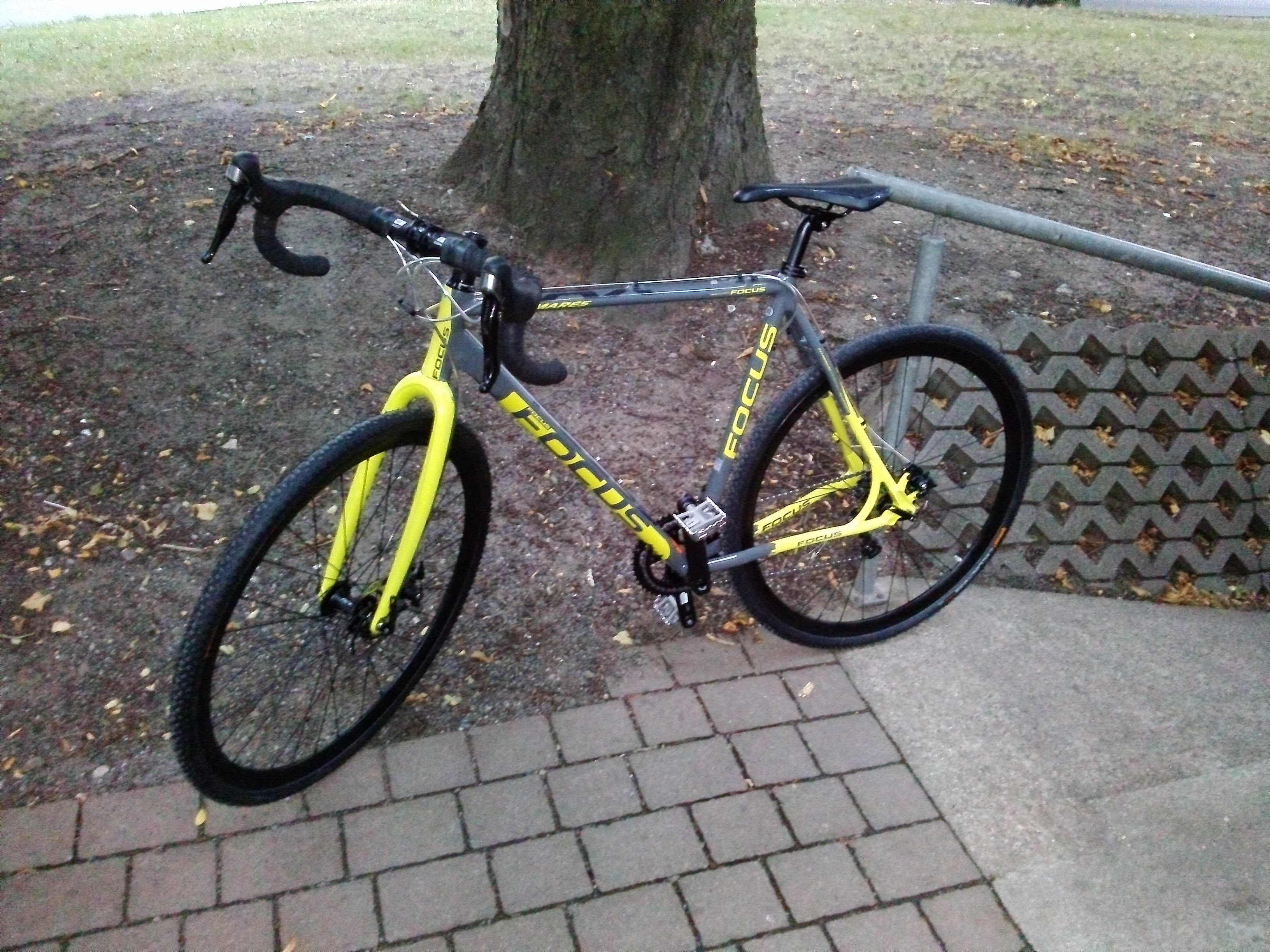 ein Cyclocross-Rad des Herstellers Focus Bikes aus dem Jahr 2013, mit etwas uncharakteristischem Scheibenbremsen und Shimano 105 Schaltung (bis auf die Kurbel von FSA)